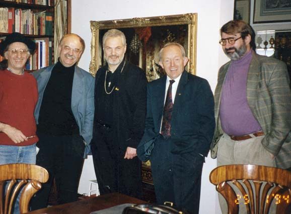 Das Team der Sendung "Der magische Effekt"